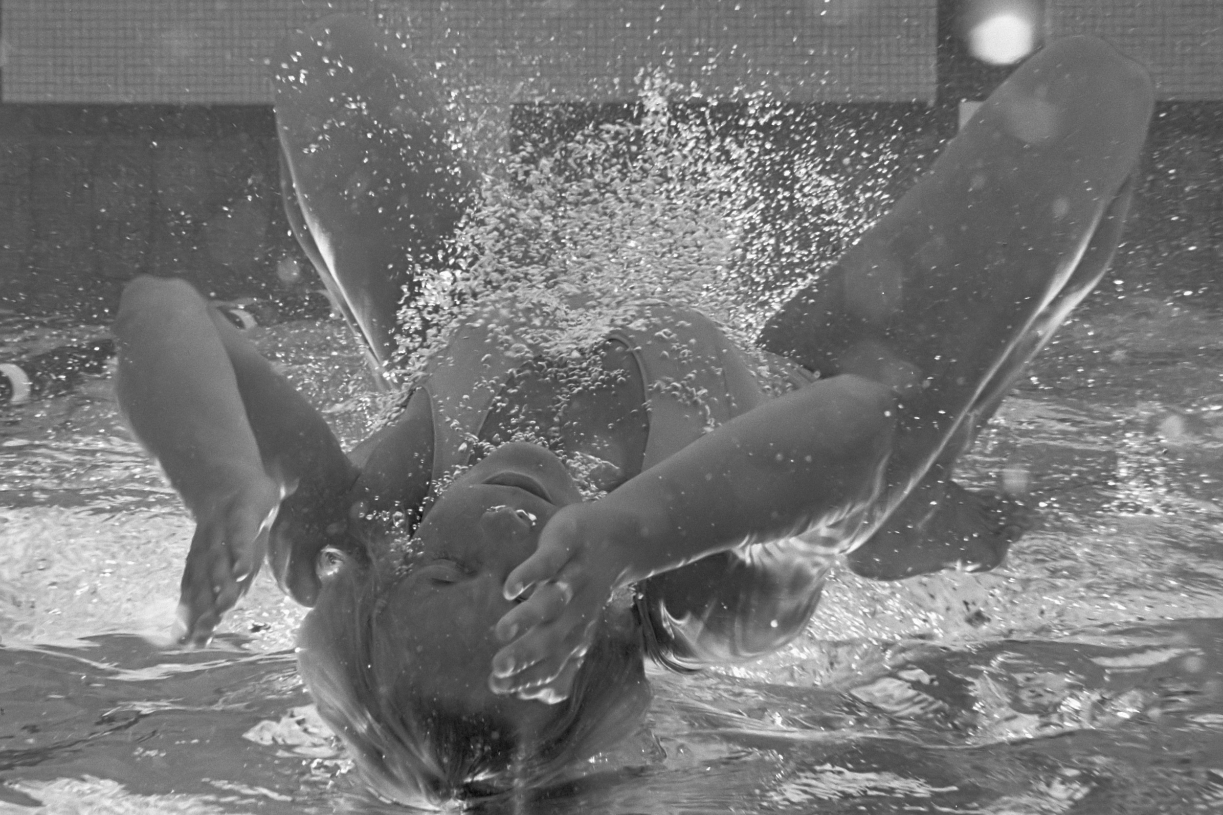 Europese Zwemkampioenschappen, Gretta Kok onder water gefotografeerd 18 augustus 1966